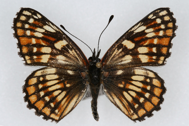 Chlosyne fulvia female